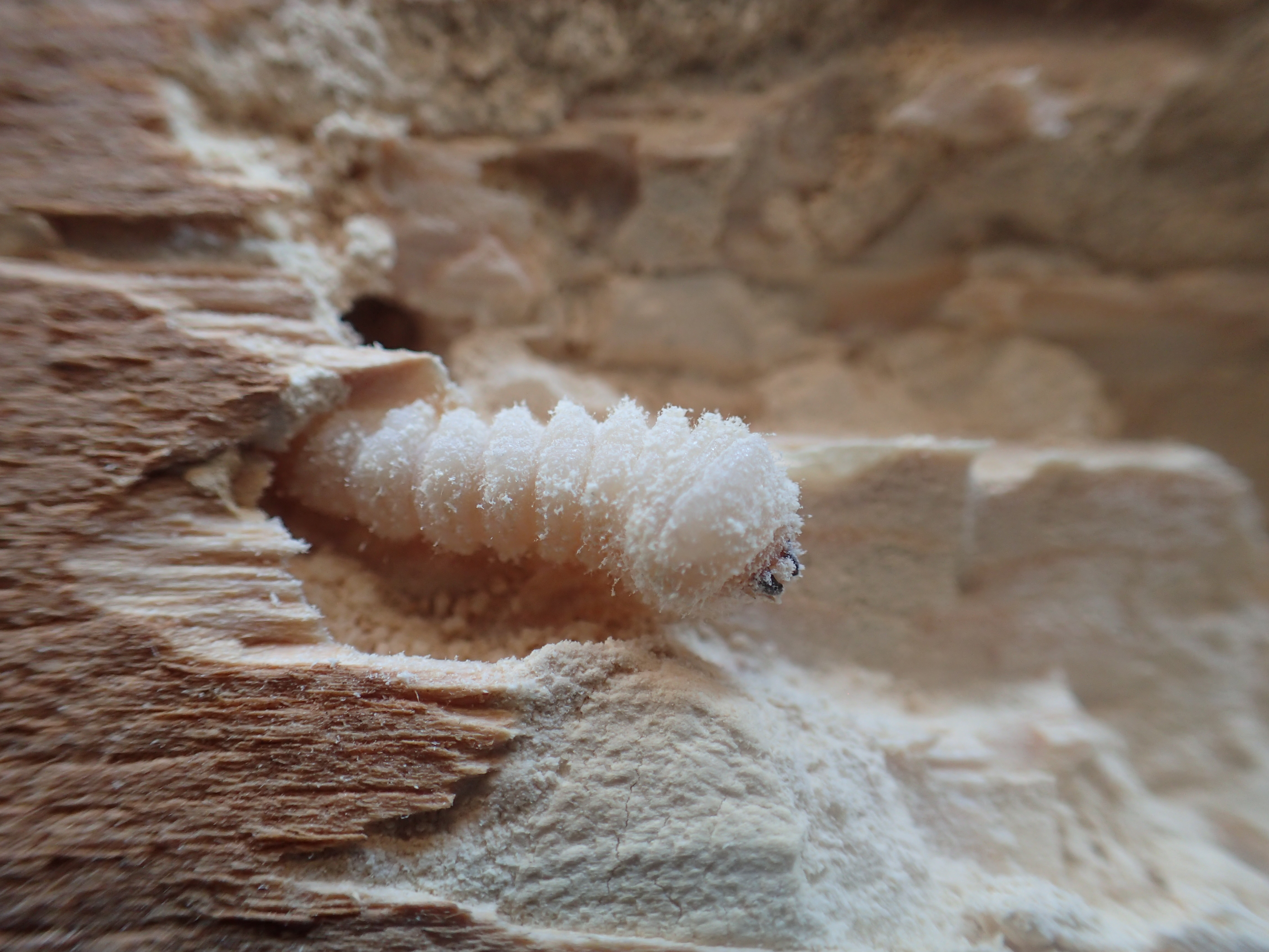 Husbukklarve i treverk.